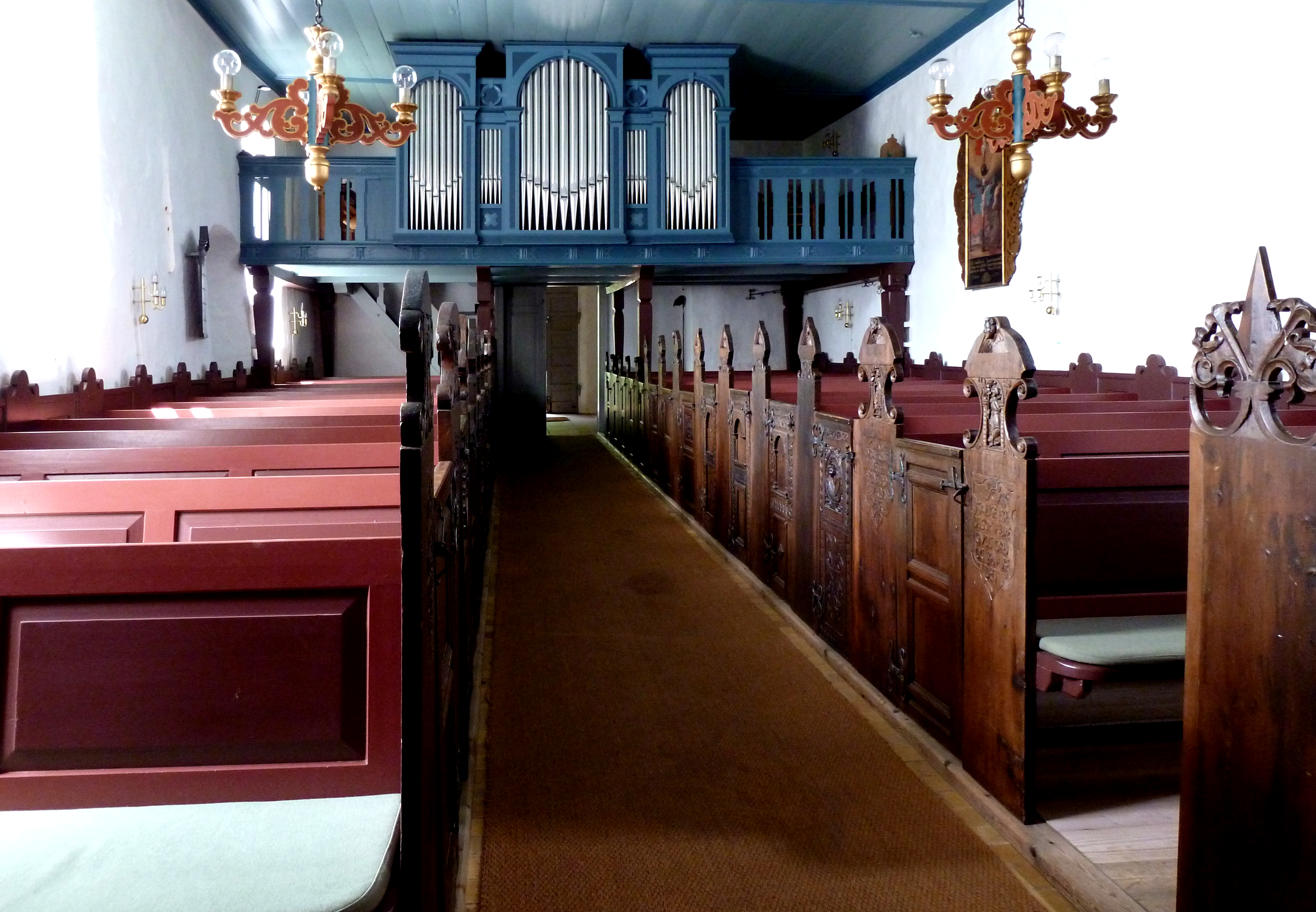 Orgel in der Daler Kirche, Tønder Kommune in Dänemark. Orgelbauer Bruno Christensen & Sønner. Aufnahmedatum 2011-05.